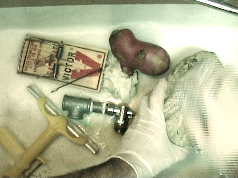 מתוך מיצב הוידאו "לאן נושבות רוחות הסתיו"